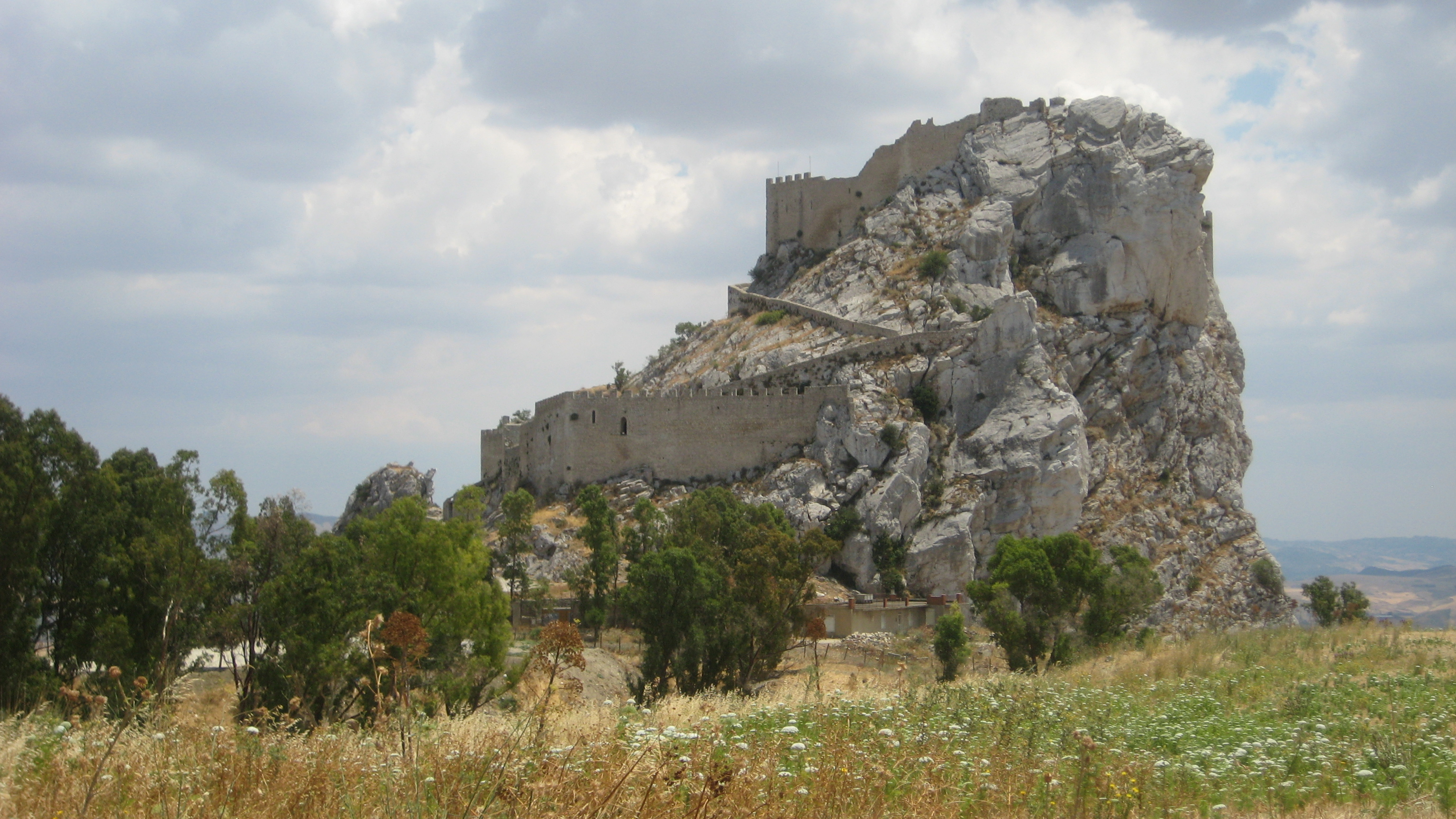 Vista da nordovest del Castello di Mussomeli (o Castello Manfredonico), a Mussomeli (provincia di Caltanissetta, Sicilia)